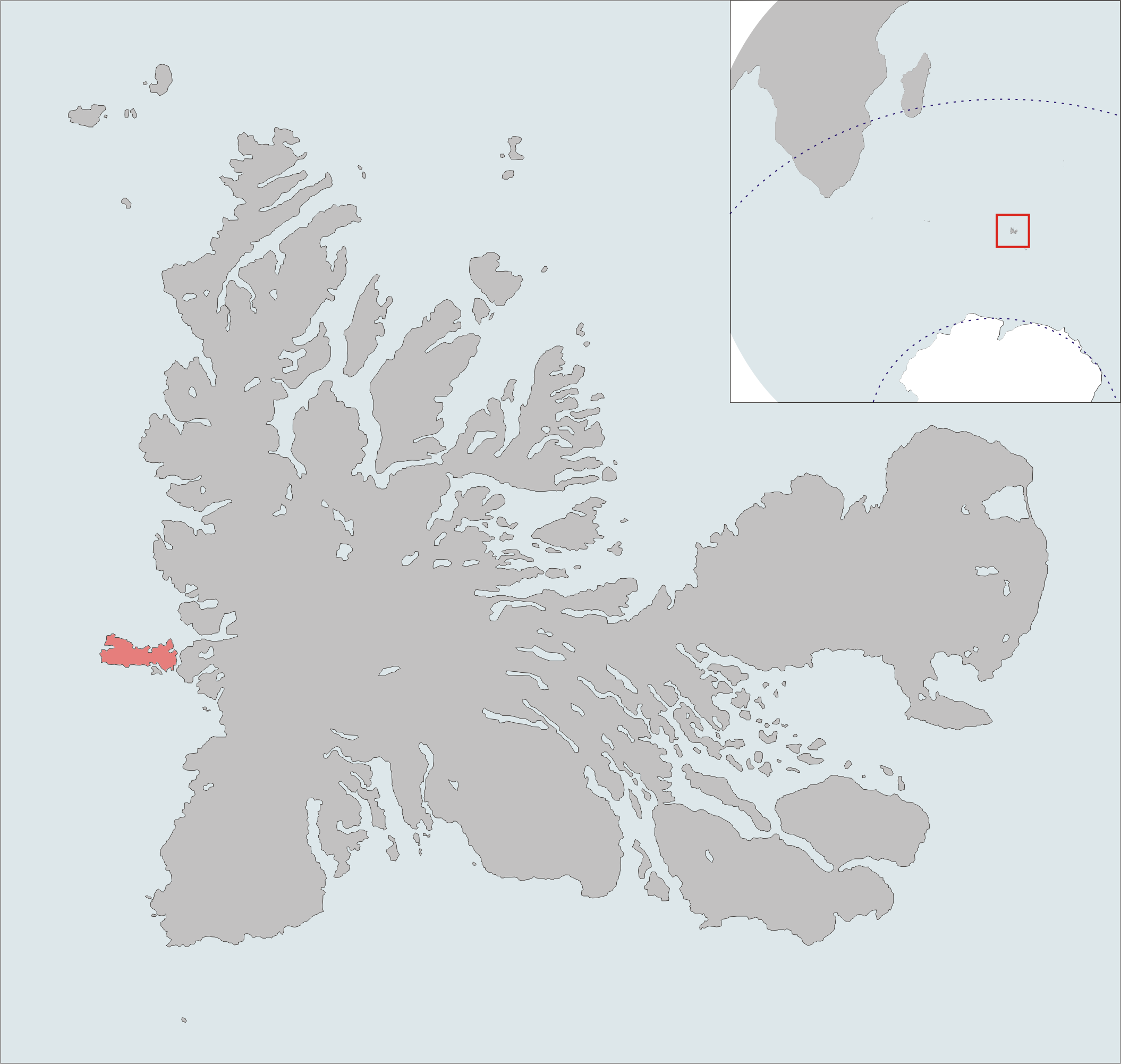 Carte